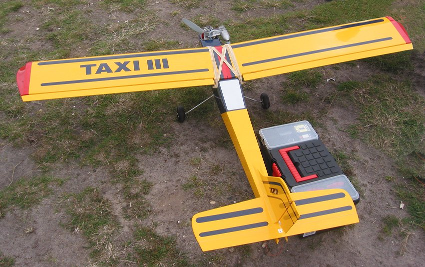 zelfgemaakte foto van modelvliegtuig met benzinemotor Taxi